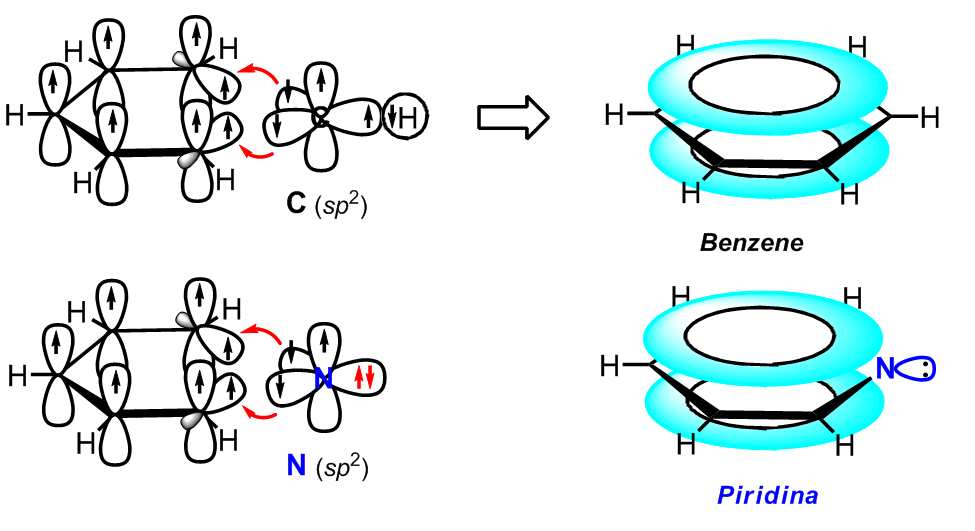 Coniugazione pigreco